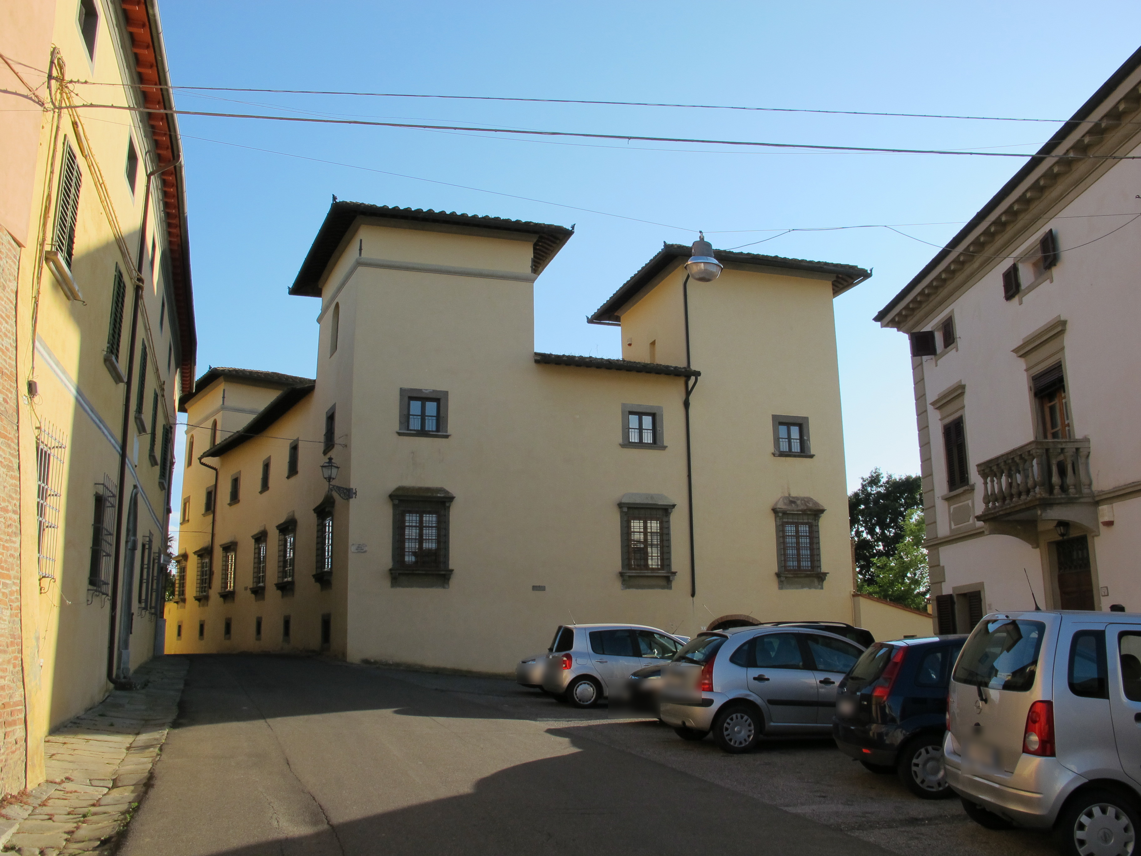 Balconevisi, villa di montebicchieri